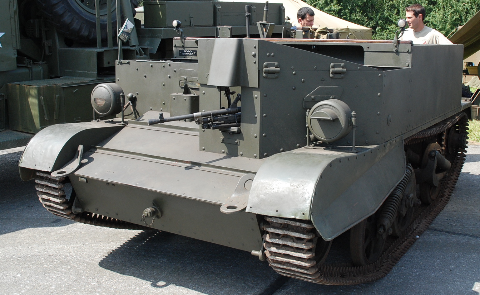 Universal carrier (mortar carrier) te Ursel, België